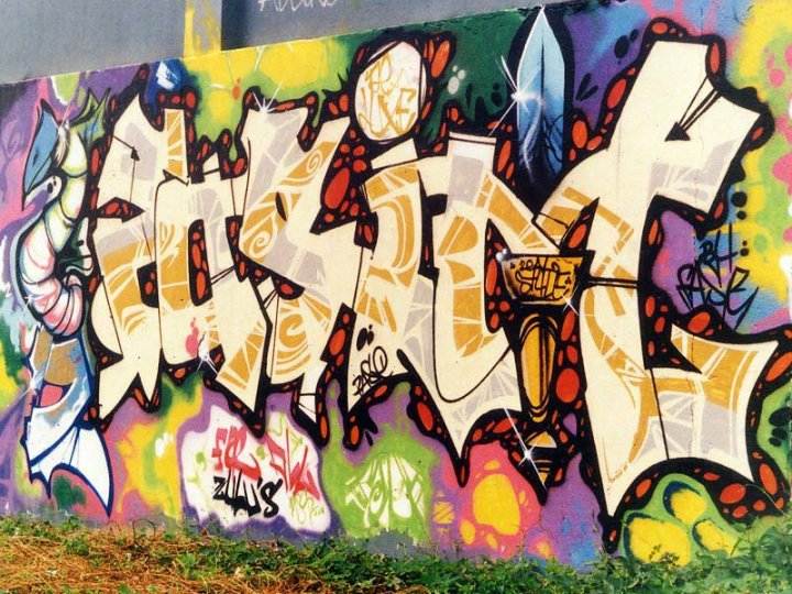 Foto de un graffiti de Fasim de la década de los 80.